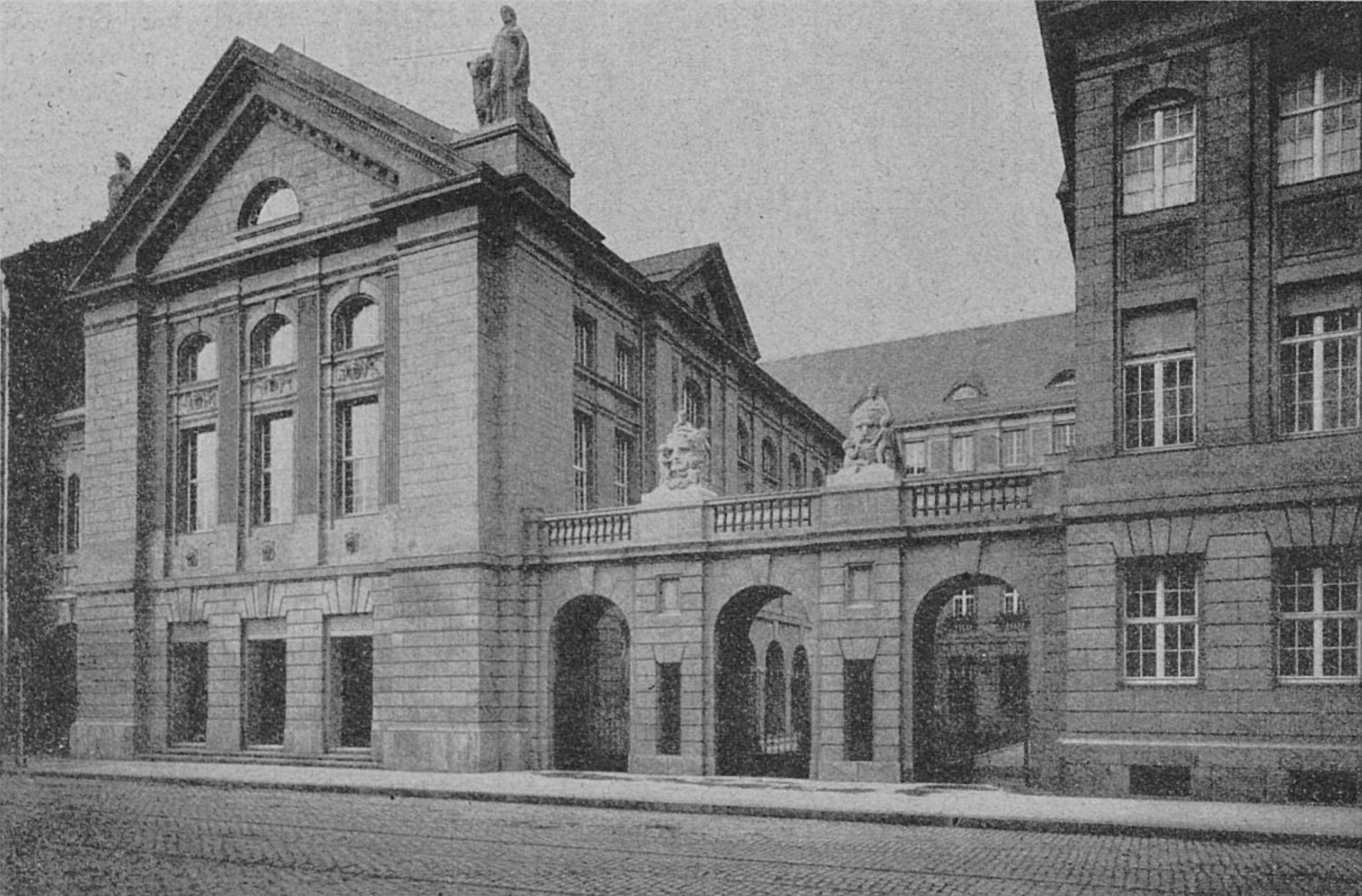 Die neuerbaute Lessingschule an der Ellerstraße in Düsseldorf. Die neue Schule (Direktor Schmitt) wurde nach Plänen des städtischen Hochbauamtes (Kgl. Baurat Beigeordneter Radke) erbaut und am Dienstag, den 16. September 1913 eingeweiht.